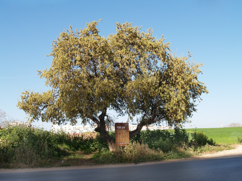 אריה שפירא צילם